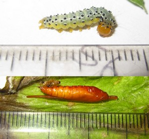 Crambidae caterpillar & pupae larvae